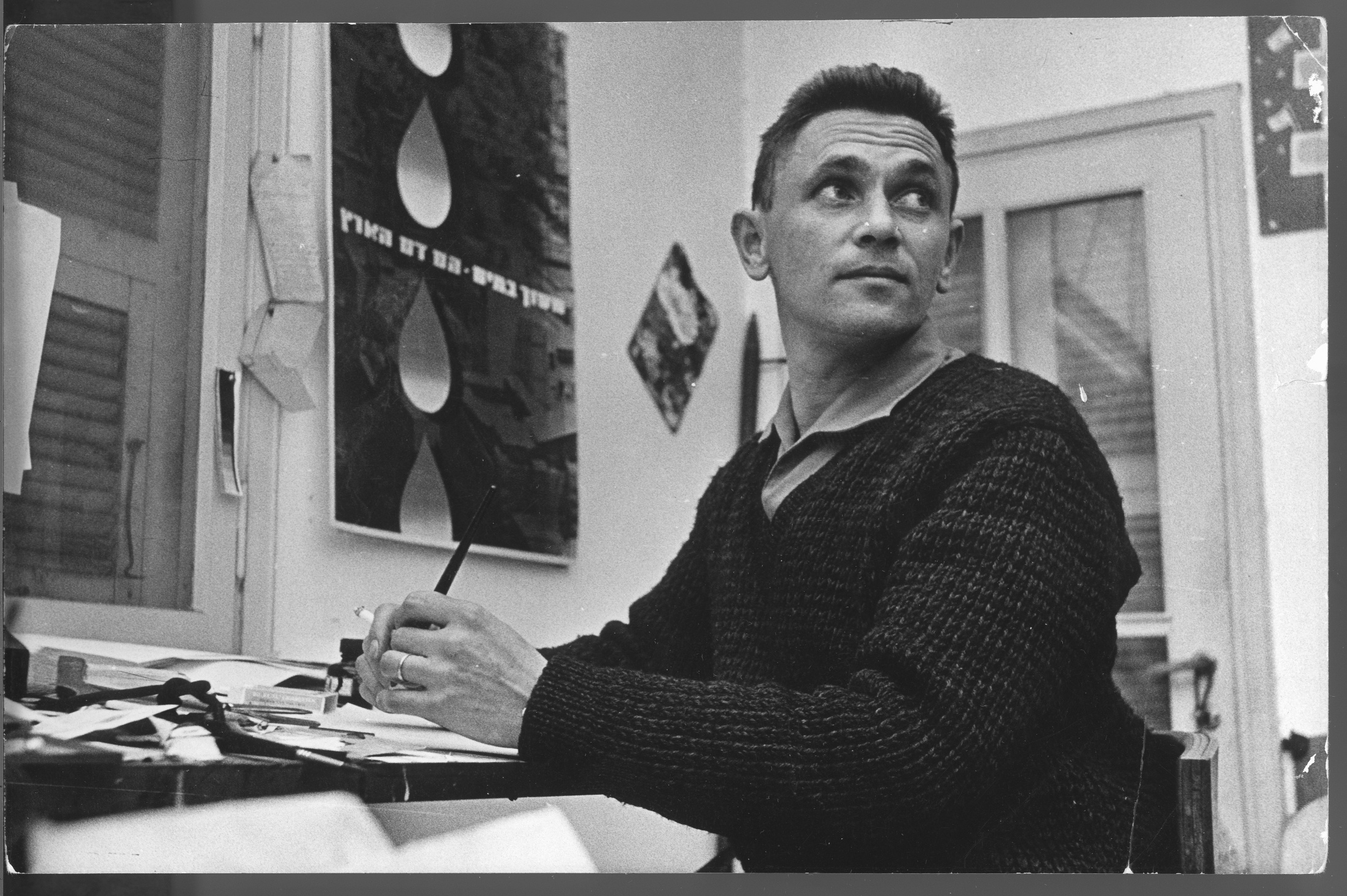 Paul Kor portrait